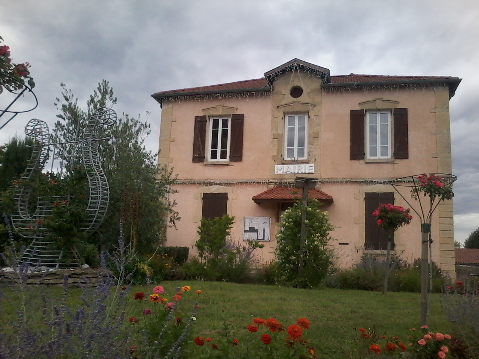 Hôtel de ville de Jardin (Isère).